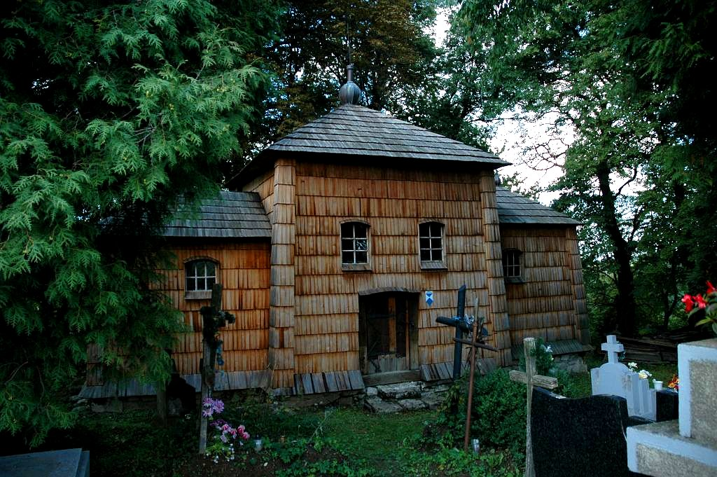 Poland, Kruhel Wielki - wooden church.